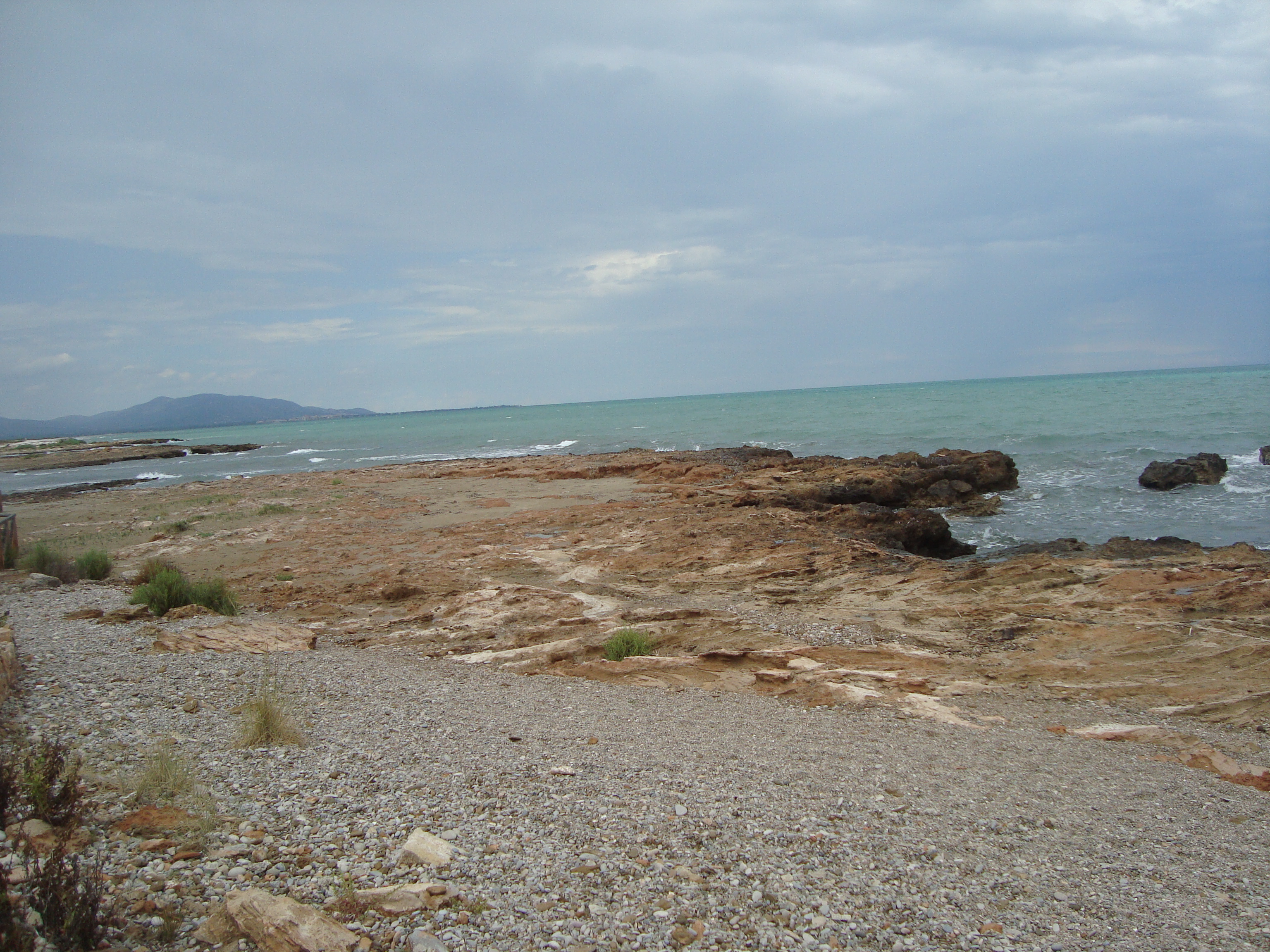 Costa rocosa de Torrelasal